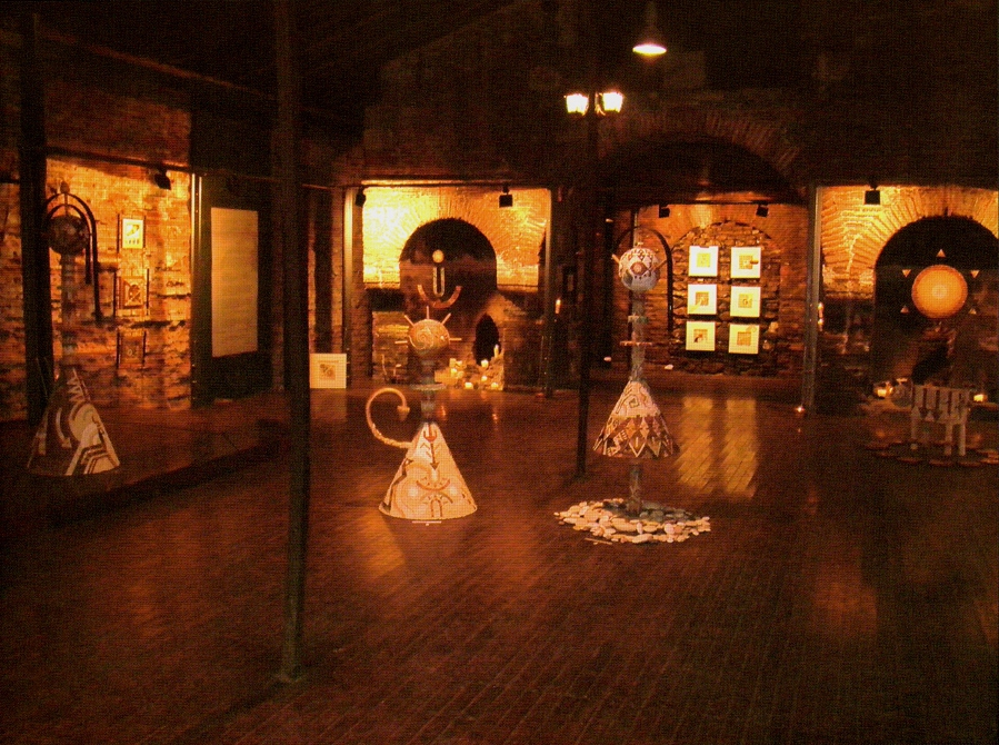 Exposition de Statuts Mosaïques de Hulya İkizgüz, à Darphane-i Amire, à İstanbul